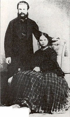 בני הזוג פריי